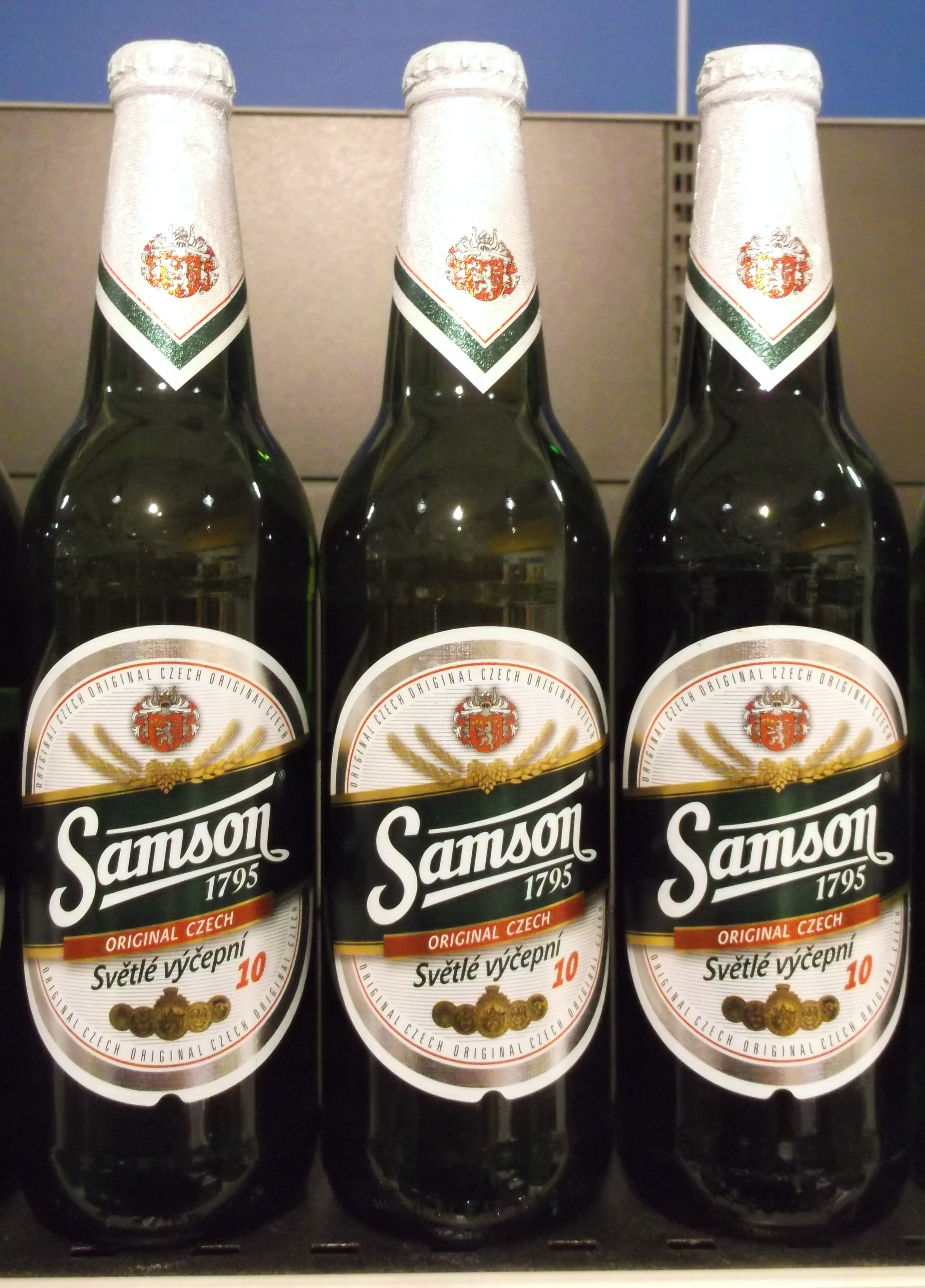 Samson - světlé výčepní